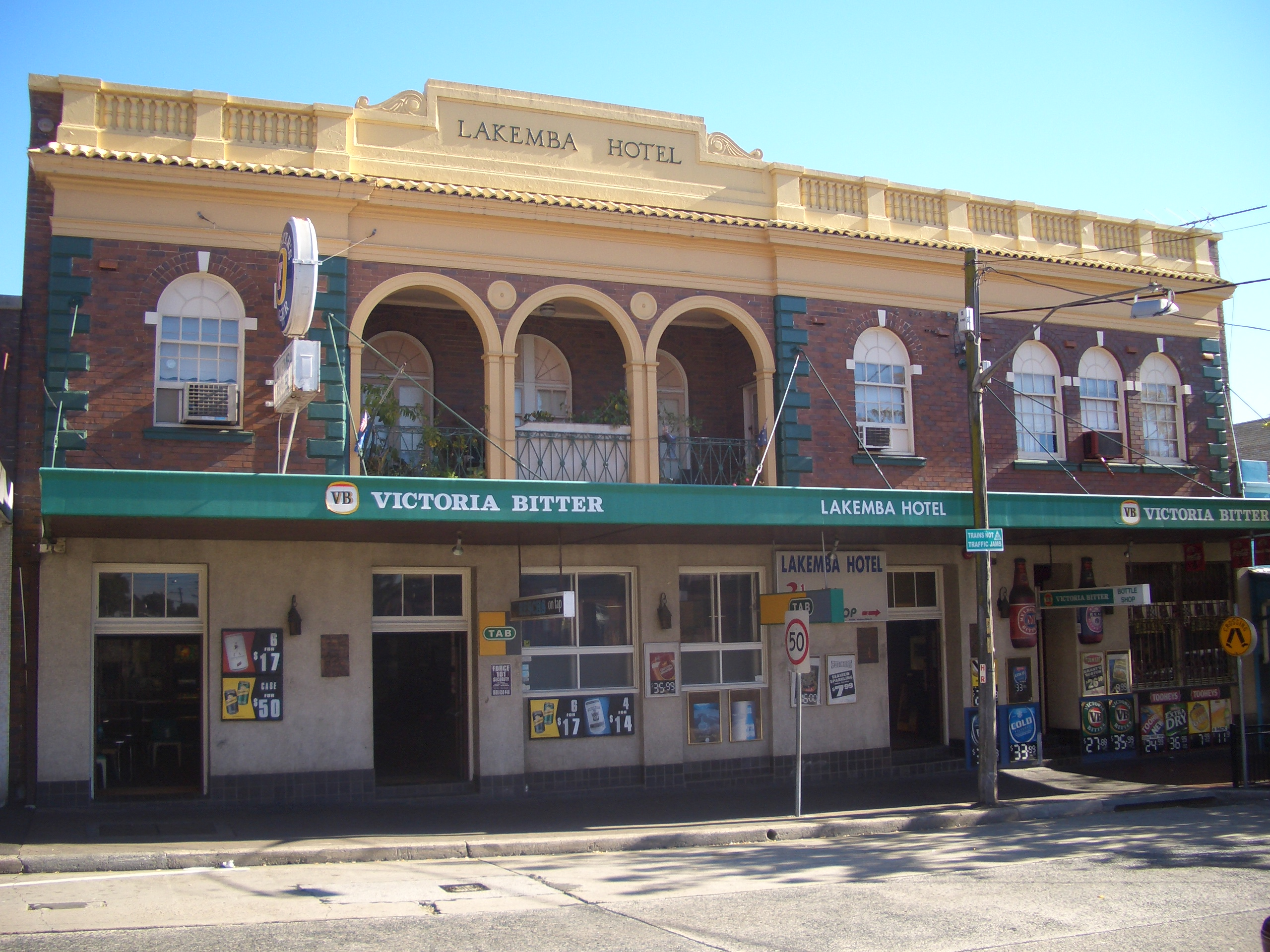 Lakemba Hotel